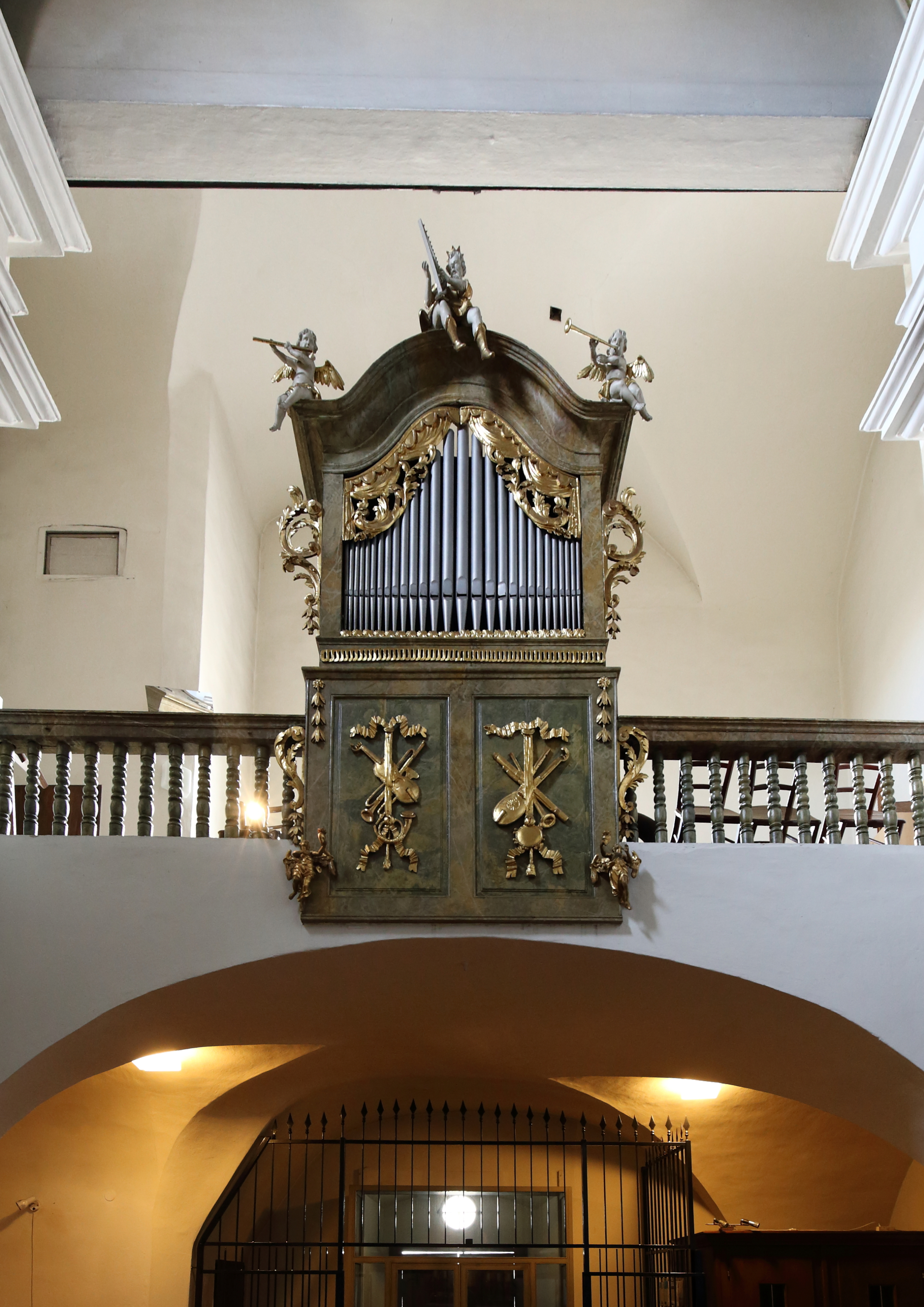 Brüstungsorgel der Rochuskapelle im 14. Wiener Gemeindebezirk. Sie stammt aus dem Jahr 1794 und ist ein Werk von Joseph Effinger († 1809), ein aus Mannheim stammender Preßburger Orgelbauer.